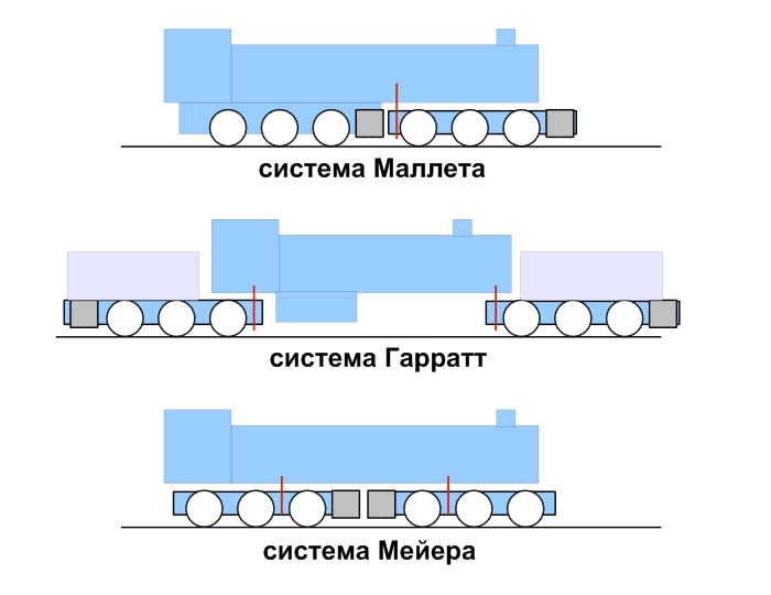 Типы сочленённых паровозов. Паровые цилиндры выделены серым цветом, оси шкворней — красным